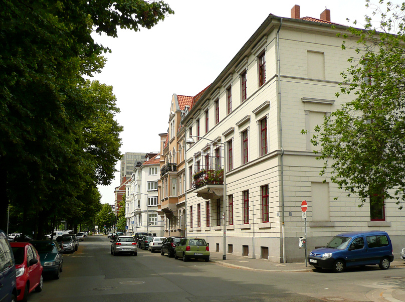 Adolfstraße